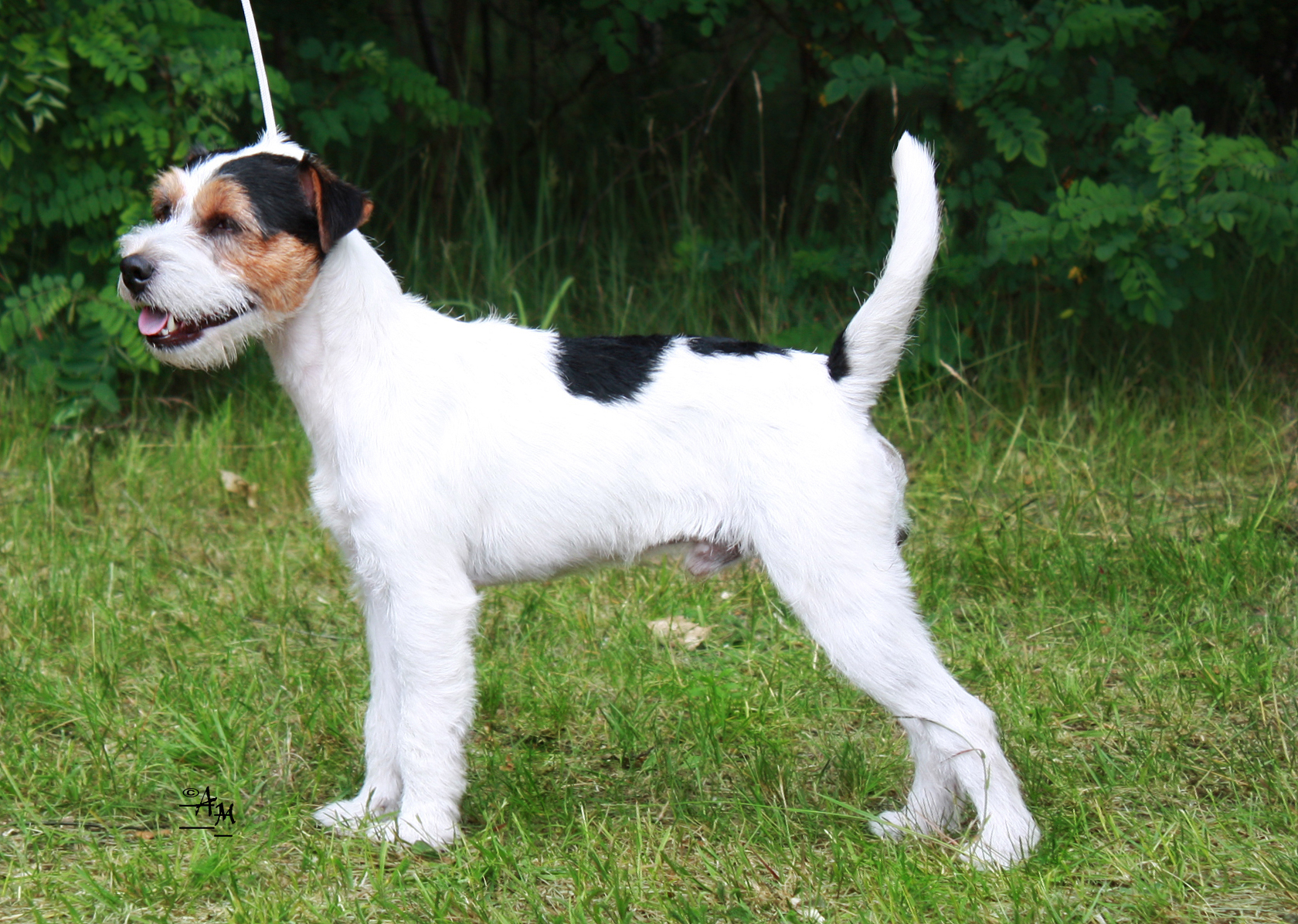 Parson Russell Terrier - male FCI-Standard N°339